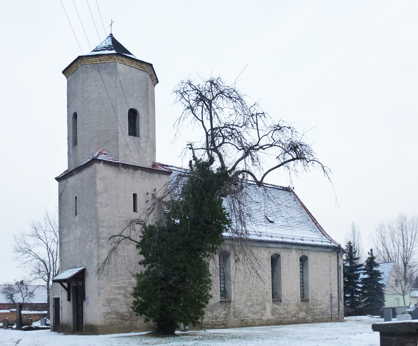 Kirche in Krensitz